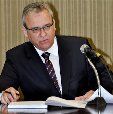 Vicente Maggio